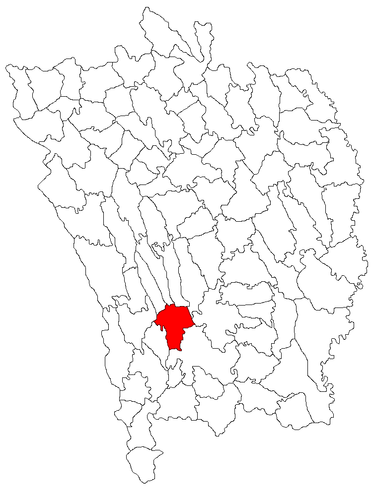 Categorie:Hărţi ale judeţului Vaslui